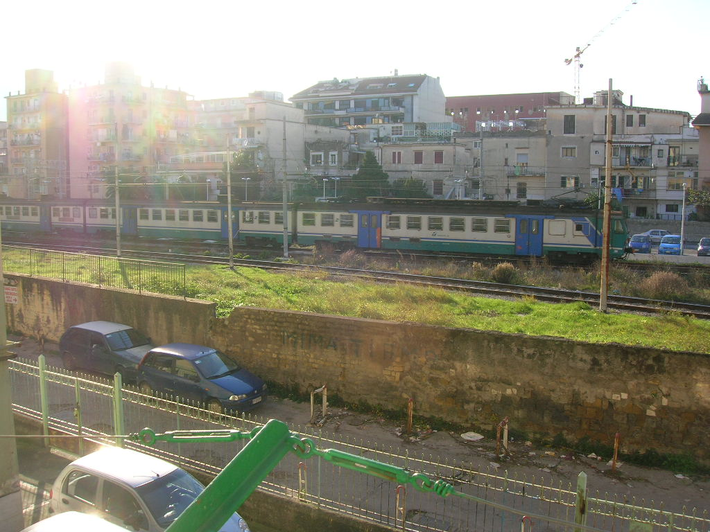 ALe 724 in arrivo nella stazione di Castellammare di Stabia